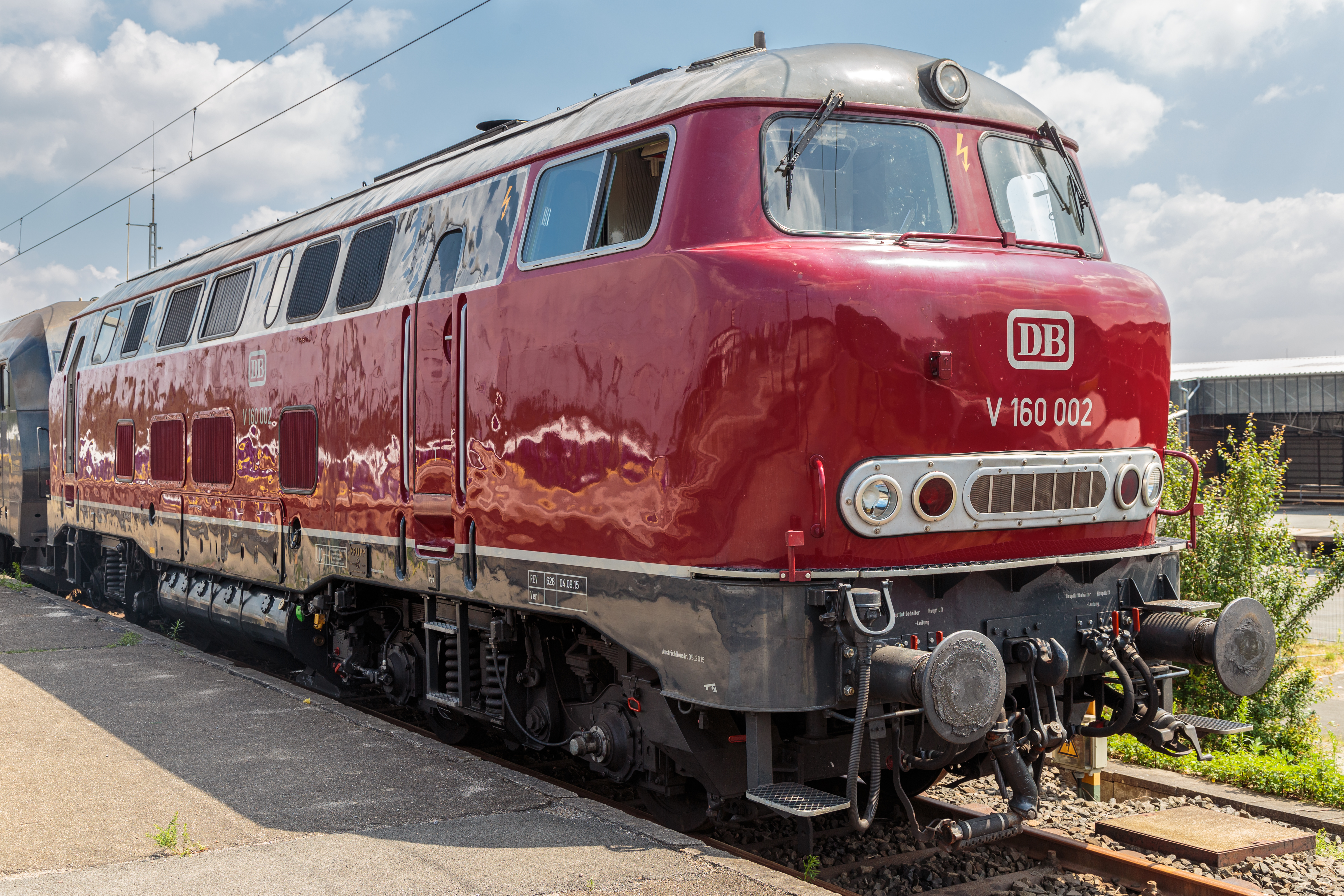 In neuem Glanz und gleissendem Lichte der Oldenburger Sonne: Vorserien-Diesellokomotive V 160 002.